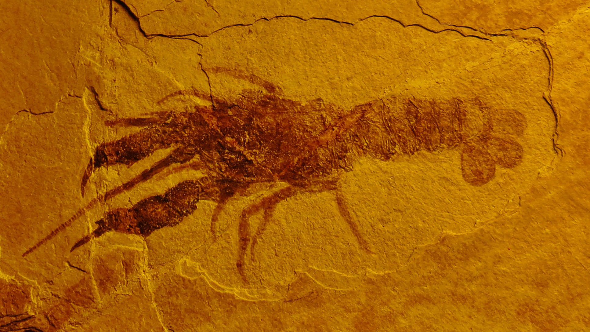 Took the picture at Burgmeister Muller Museum, Solnhofen